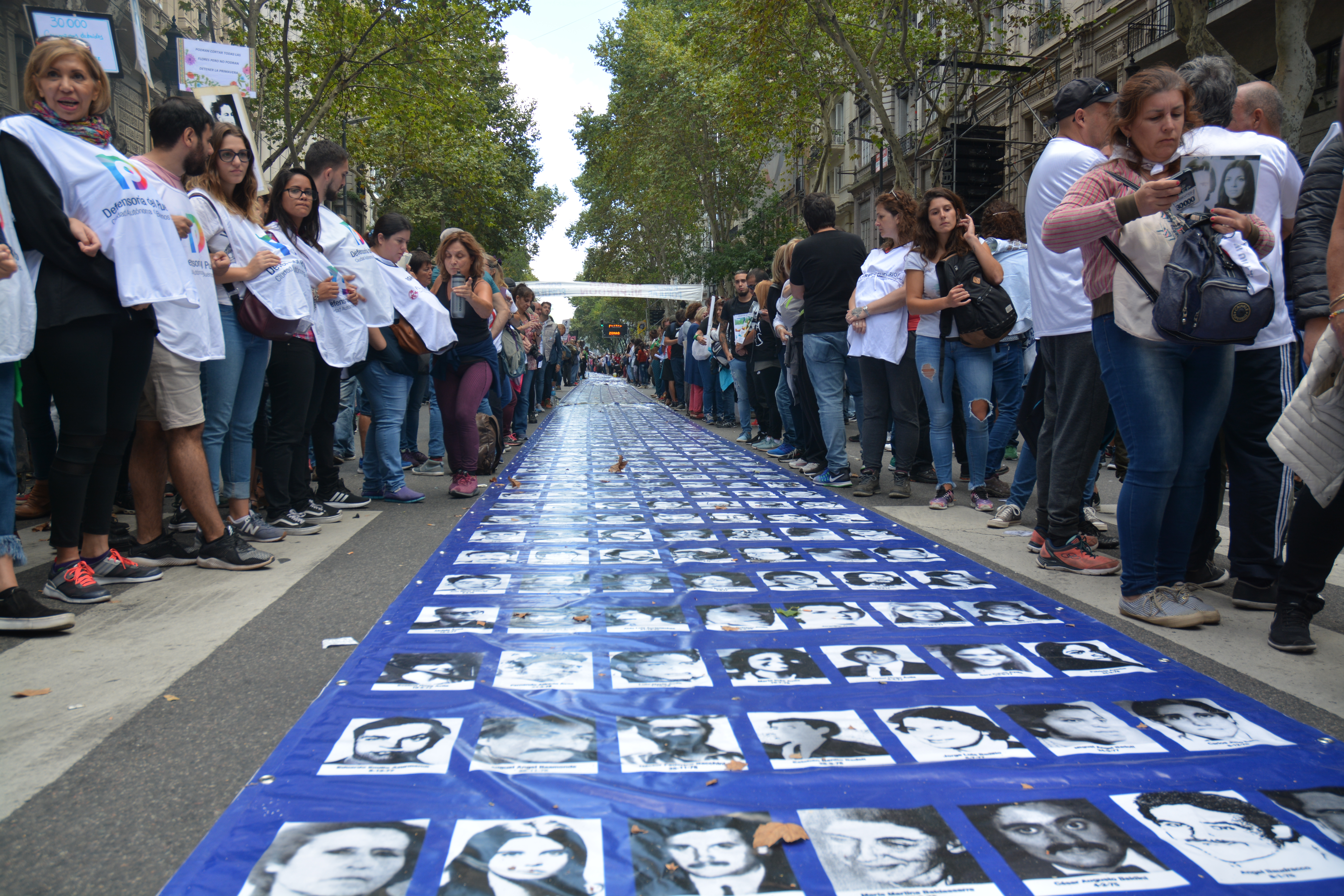 Marcha por el Día por la Memoria, la Verdad y la Justicia en la Ciudad Autónoma de Buenos Aires